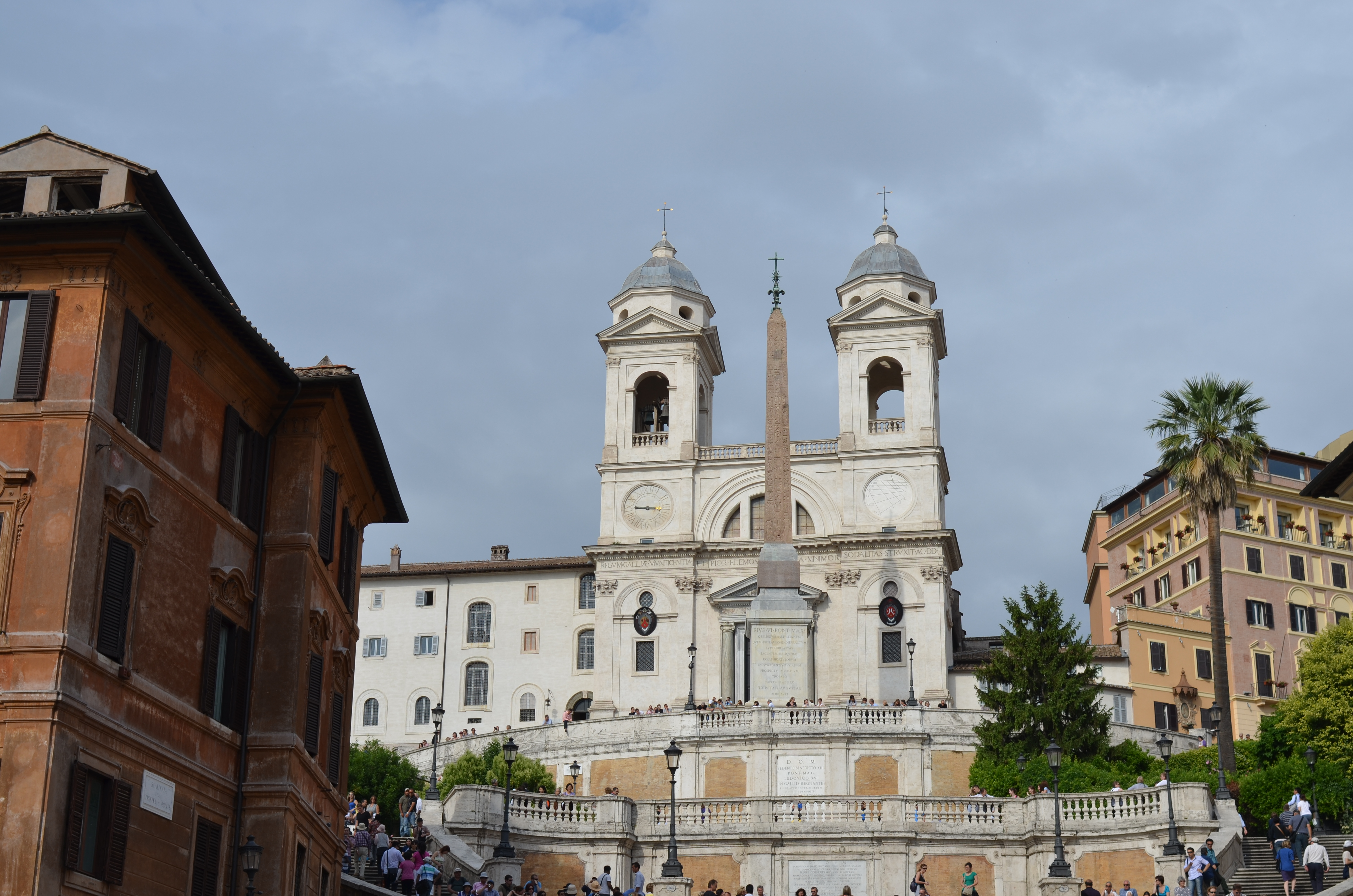 Rome, Roma, Rom